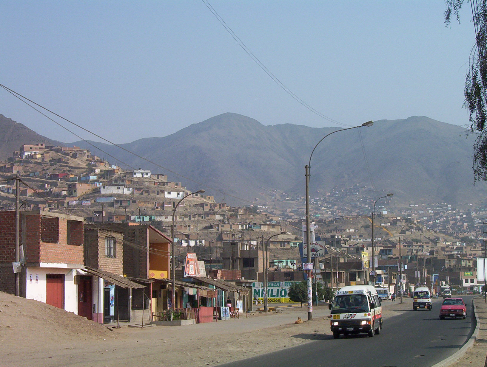 Carabayllo. Km. 17